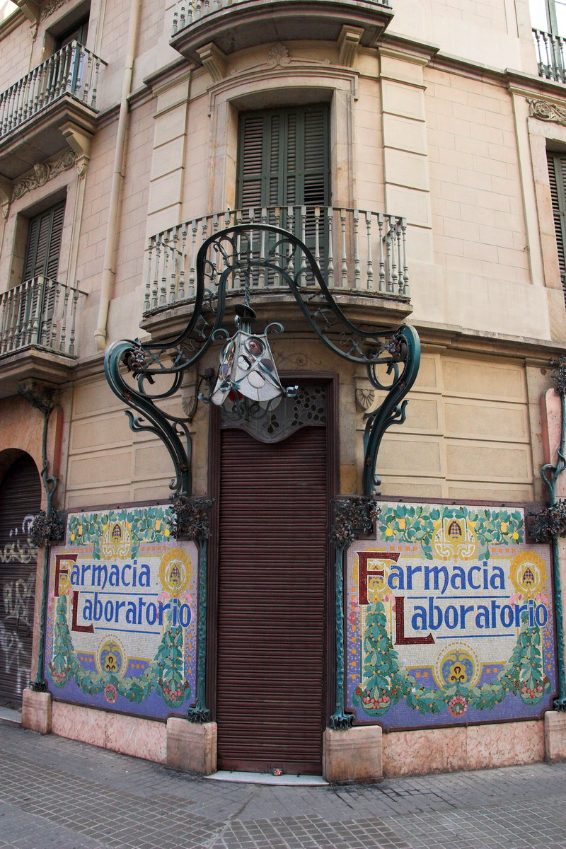 Antiga farmàcia Viladot (Ronda de Sant Pere, 40 - Barcelona, Catalunya), obra de Fèlix Cardellach. Oberta l'any 1905 pel doctor Palomas, de l'ornamentació original en resta només l'estructura metàl·lica de la façana, de formes corbes i amb un fanal a l'angle, i part del mobiliari a l'interior. Inicialment tenia aparadors amb vitralls modernistes, substituïts per uns mosaics de brillant policromia, obra del taller de Lluís Bru.